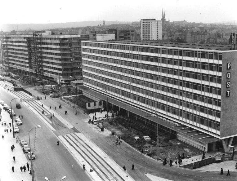 Chemnitz, Straße der Nationen, Haupt-Postamt Zentralbild Thieme 7.10.1967 Zum 18. Jahrestag der Gründung der DDR Karl-Marx-Stadt: Haupt-Postamt eröffnet In der Straße der Nationen, der Magistrale der sächsischen Bezirkshauptstadt, wurde eines der modernsten Postämter der DDR am 6.Oktober 1967 eröffnet. Das großzügig gestaltete achtgeschossige Gebäude wurde von den Bauarbeitern drei Monate vor dem geplanten Termin fertiggestellt.